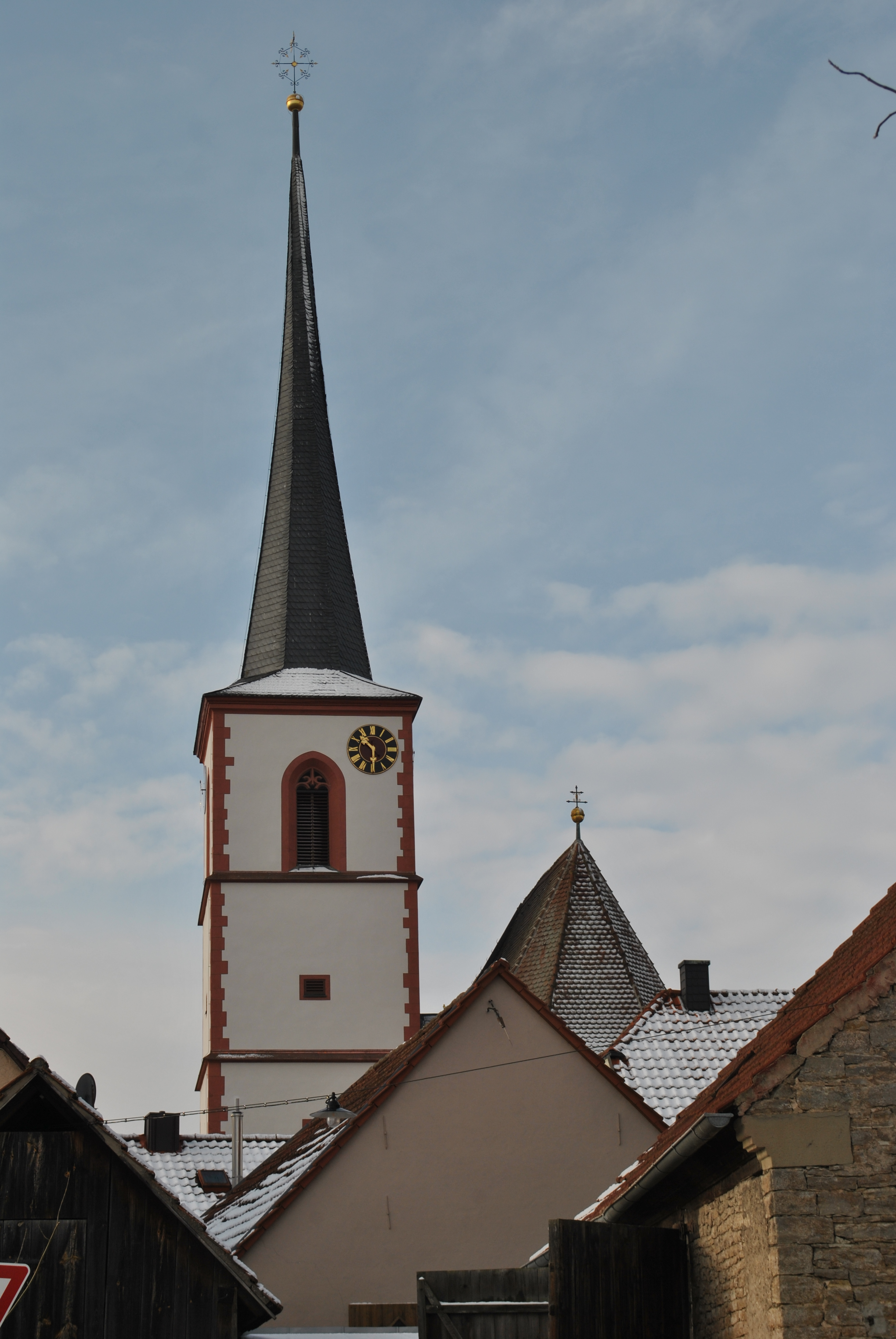 Katholische Pfarrkirche St. Eucharius Saalbau mit polygonalem Chorabschluss, Langhaus 1560–66, Turm 1589 über älterem Untergeschoss, Chor 1567/68, vergrößert 1756/57; mit Ausstattung D-6-75-169-26, neue Farbe nach Renovierung 2017